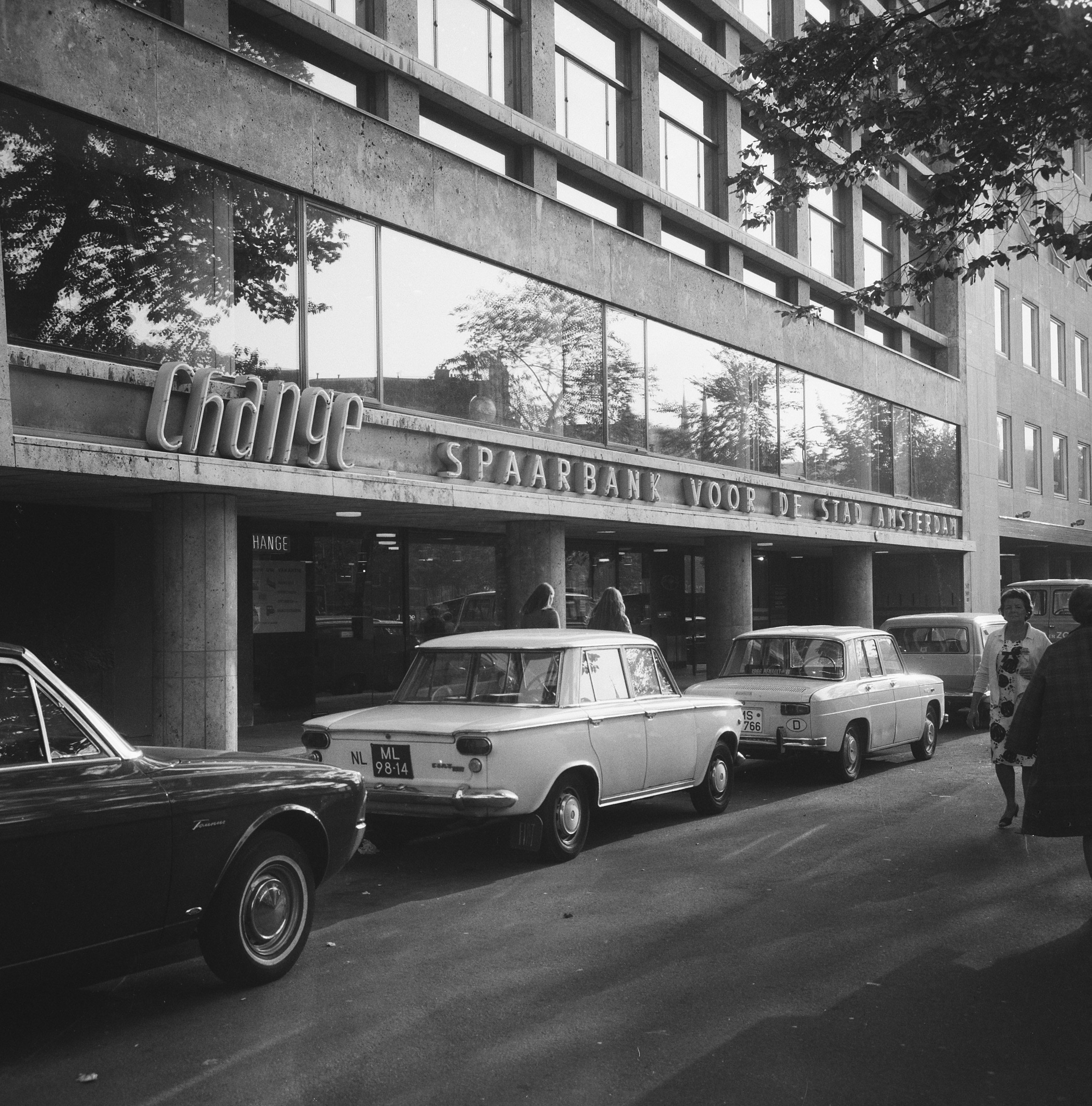 Collectie / Archief : Fotocollectie Anefo Reportage / Serie : [ onbekend ] Beschrijving : Roofoverval op spaarbank aan de Singel. Exterieur Datum : 11 augustus 1967 Trefwoorden : SPAARBANKEN, exterieur, roofovervallen Fotograaf : Jongerhuis, Pieter / Anefo Auteursrechthebbende : Nationaal Archief Materiaalsoort : Negatief (zwart/wit) Nummer archiefinventaris : bekijk toegang 2.24.01.03 Bestanddeelnummer : 920-5917 Reacties Geplaatst door Maaike op 01 november 2013 - 23:45. Roofoverval op Spaarbank voor de Stad Amsterdam aan de Singel. Exterieur Plaats: Amsterdam, Noord-Holland